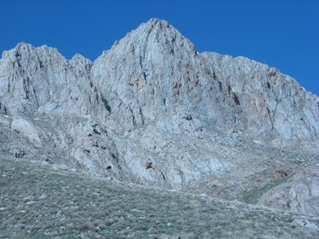 تصویر تکه قیه سی